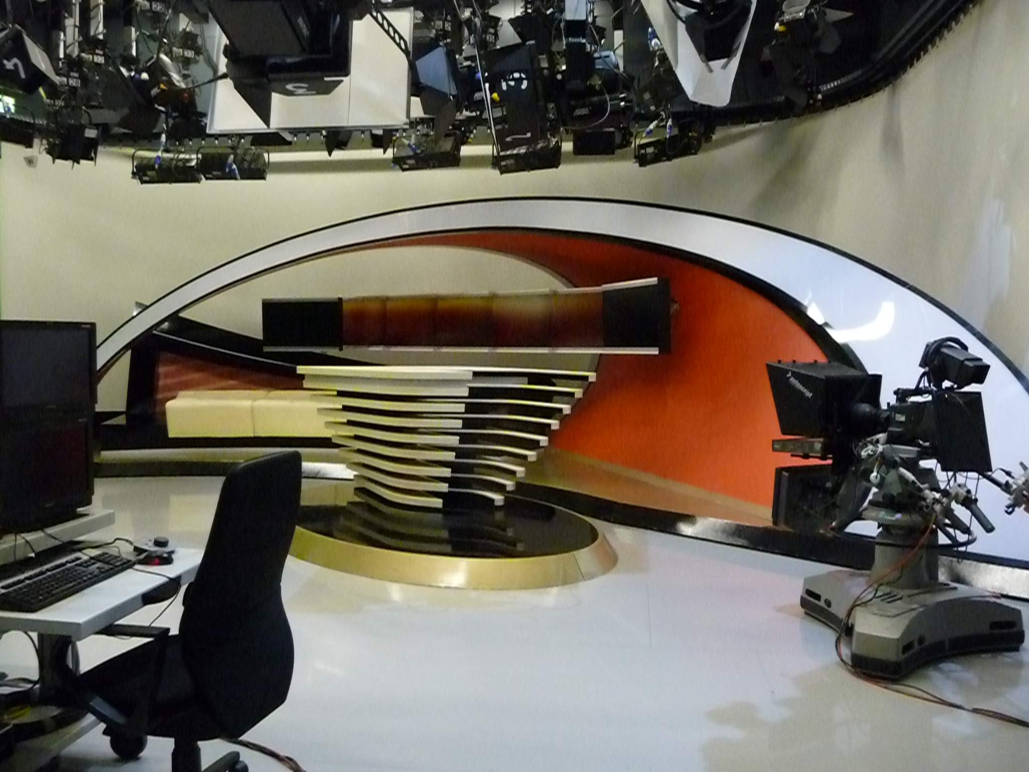 Studio der MDR-Sendung "Brisant" 2014, eigenes Foto, entstanden anlässlich einer Führung beim mdr.